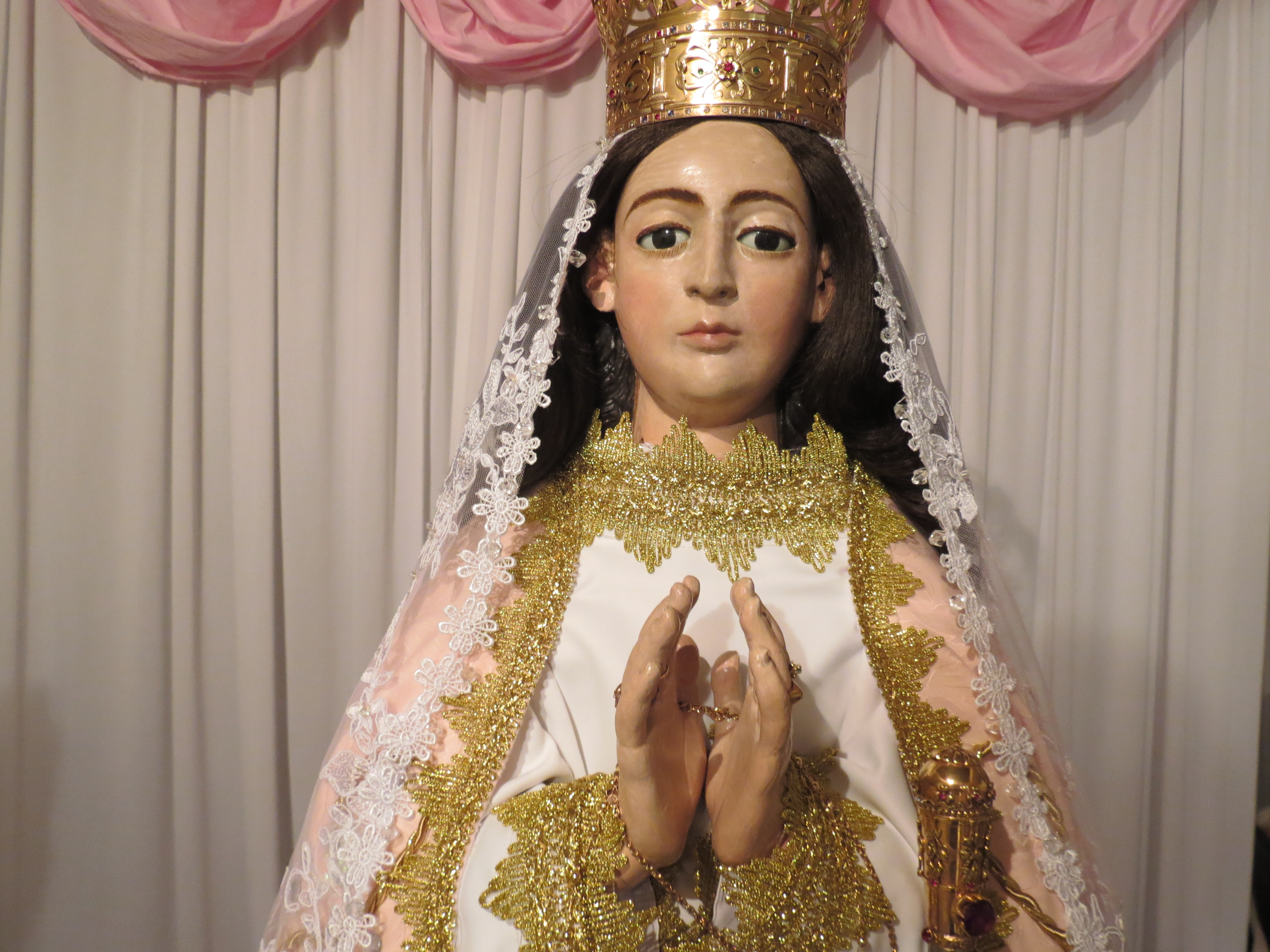 Escultura de santa María Virgen, bajo la advocación de Nuestra Señora de la Limpia Concepción del Rescate de Ujarrás, venerada en su santuario en Paraíso, Cartago, Costa Rica.